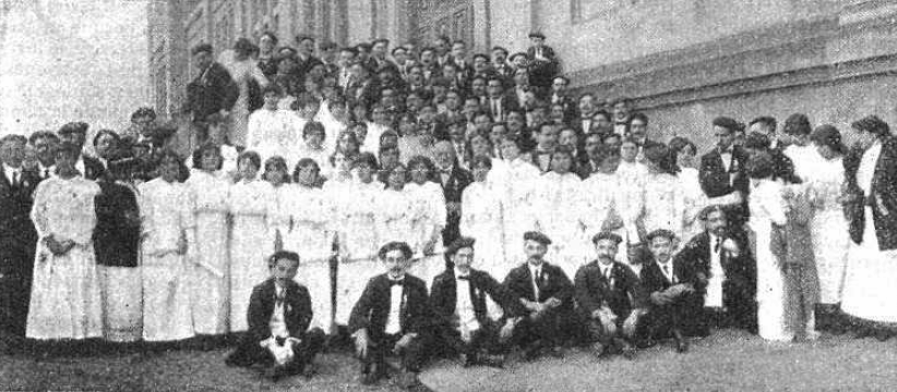 Fotografía de los integrantes de la Sociedad Coral de Bilbao publicada en 1913, tras haber ofrecido una serie de conciertos en Barcelona.